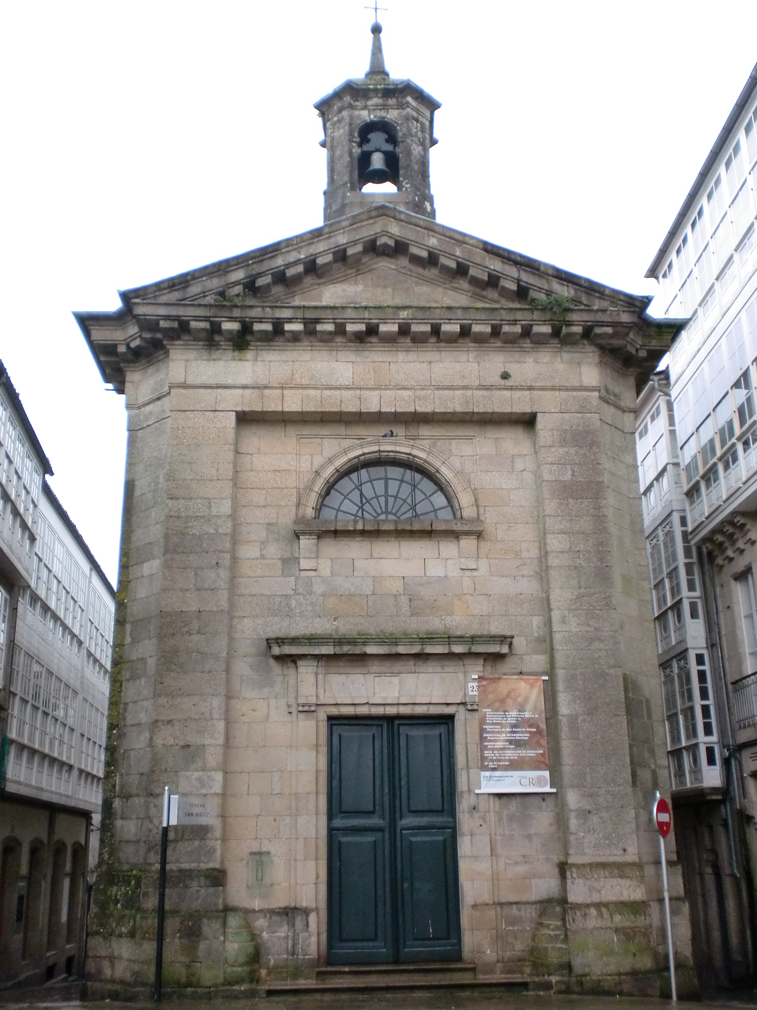 Igrexa de San Bieito do Campo, Santiago de Compostela